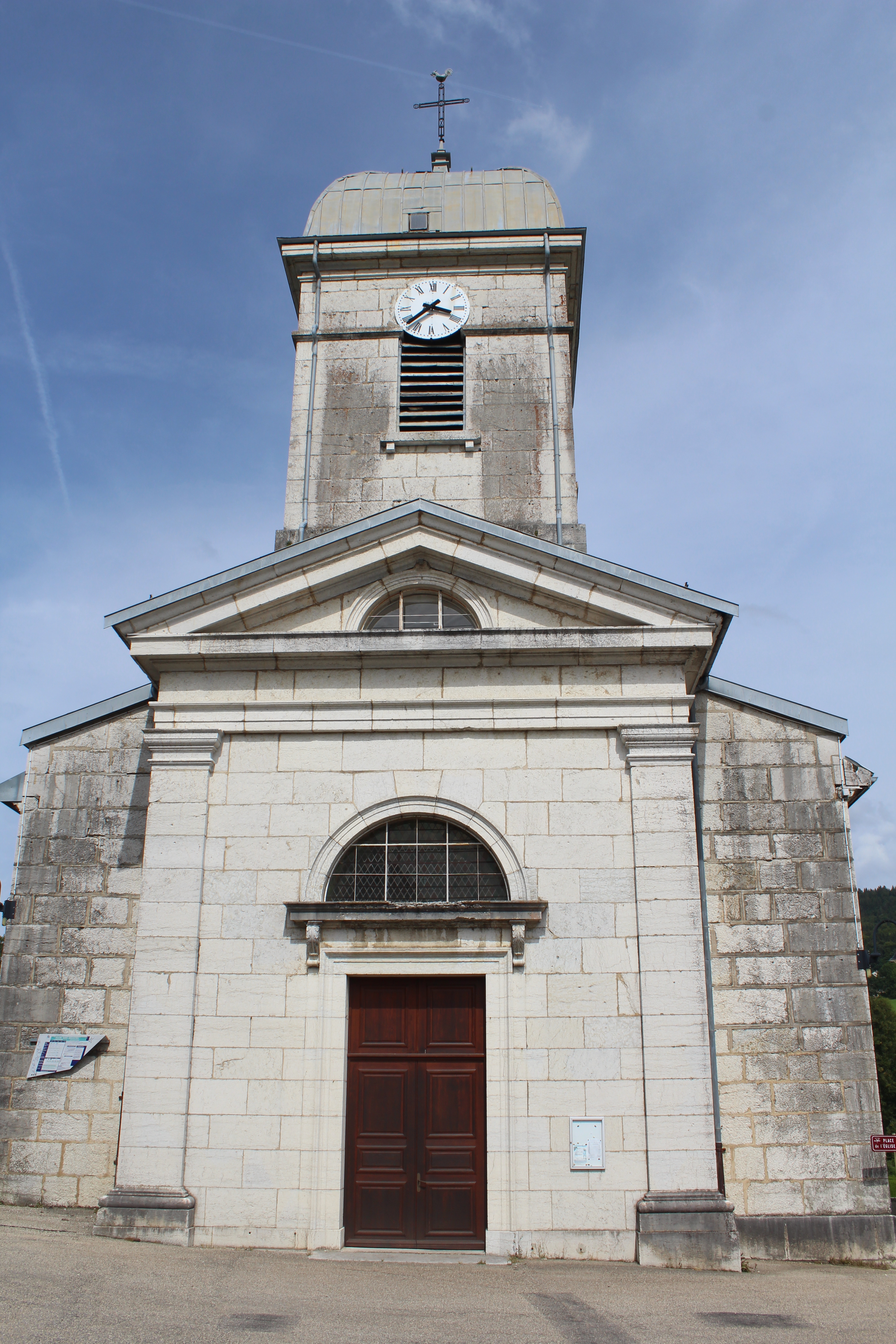 Église Saint-Sébastien de Belleydoux.